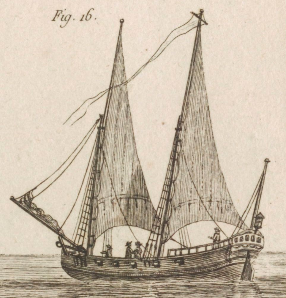 Dessin extrait du Traité pratique du gréement des vaisseaux et autres bâtiments de mer. Tome 2. 1791. Dessin de Lescallier Daniel, gravé par Petit.